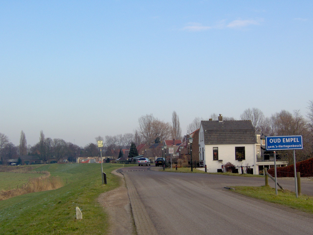 eigen foto